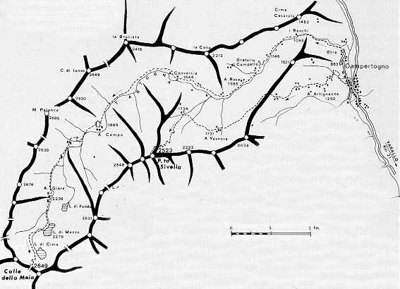 cartina rigurdante la valle artogna